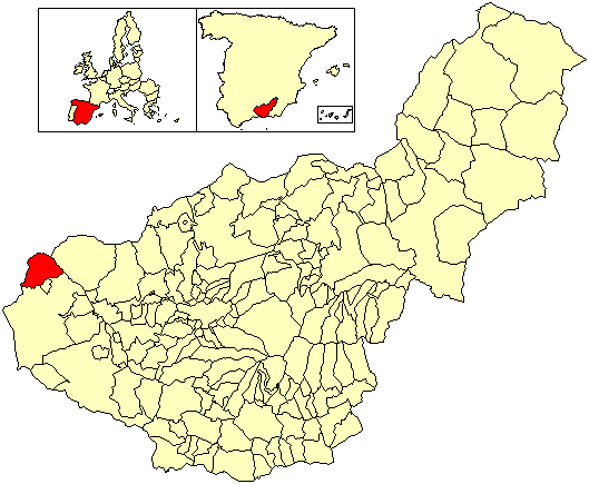 Situación del término municipal de Algarinejo respecto a la provincia de Granada, en España.